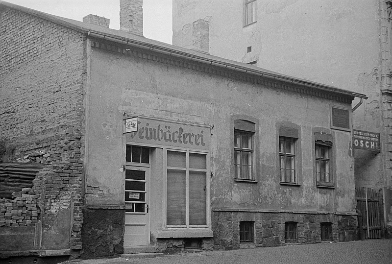 Original image description from the Deutsche Fotothek Geburtshaus Karl Liebknechts in der Braustraße 15